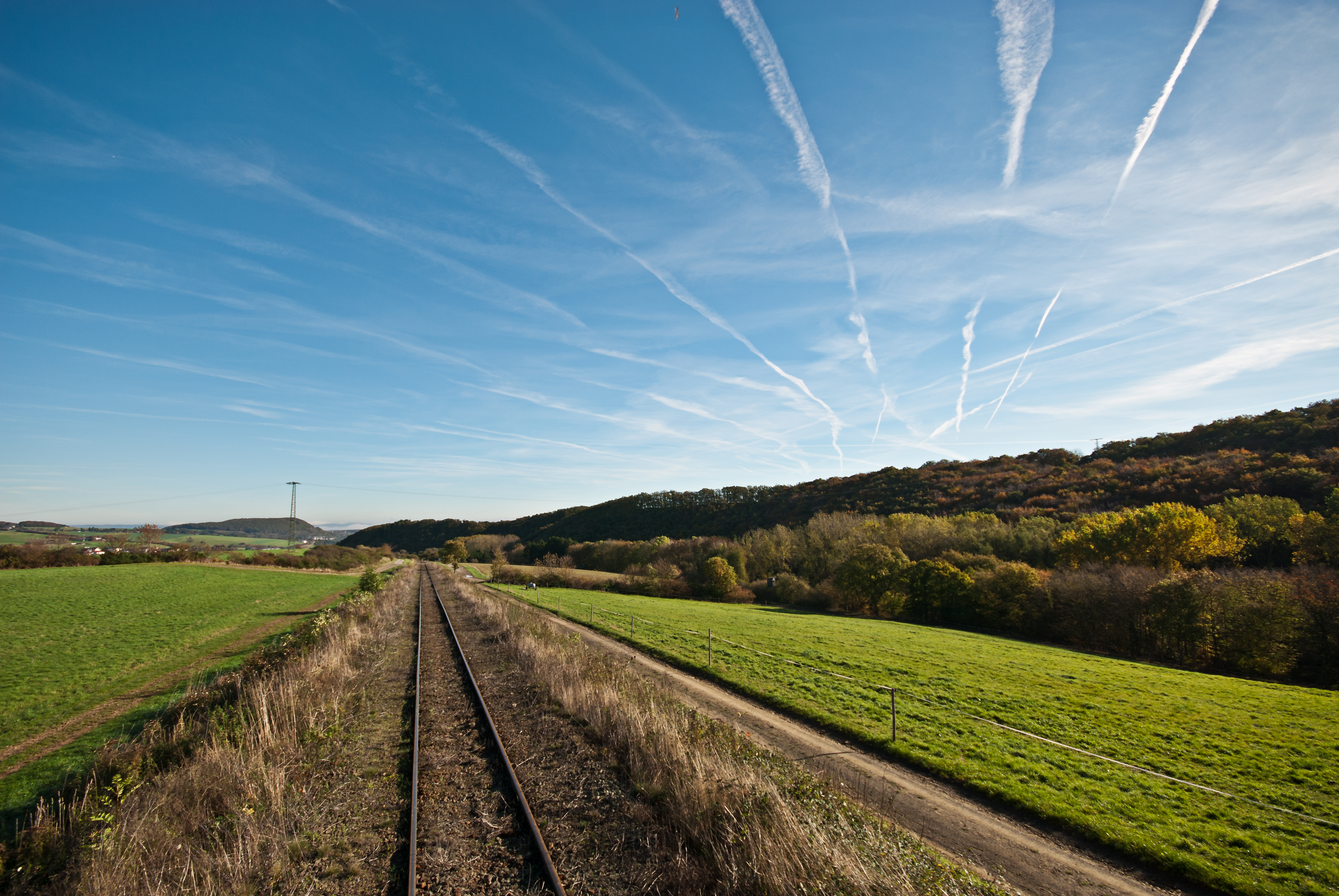 Fahrt über die Steilstrecke, hier zwischen Oberzissen und Brenk, Blick talwärts